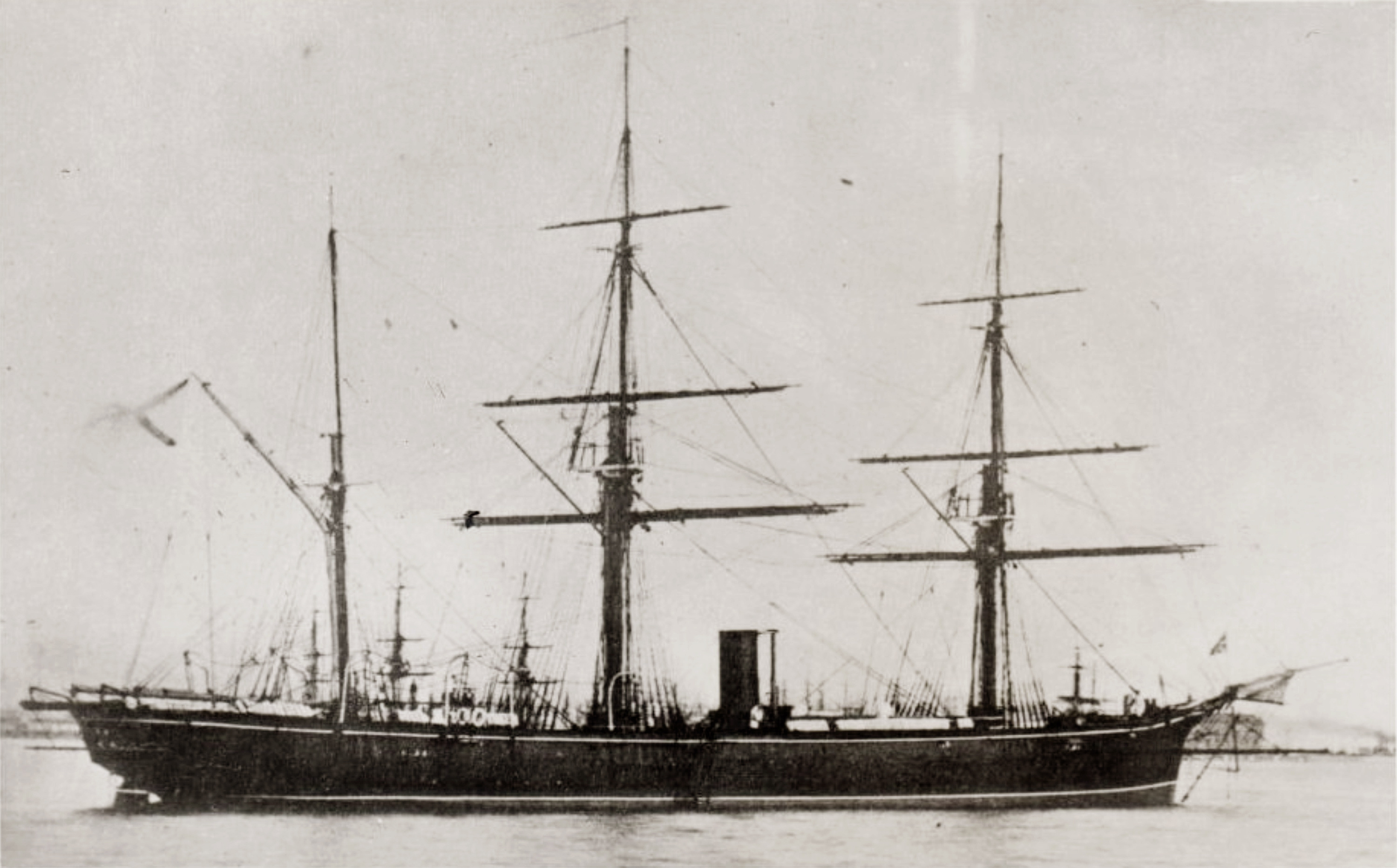 Клипер "Изумруд"